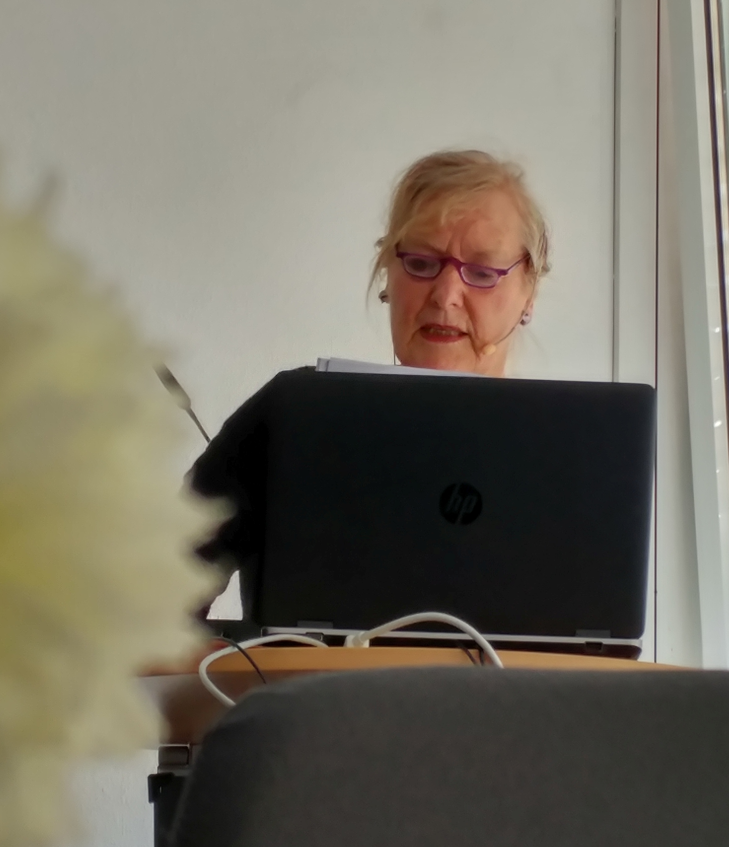 Mascha Riepl-Schmidt 2028